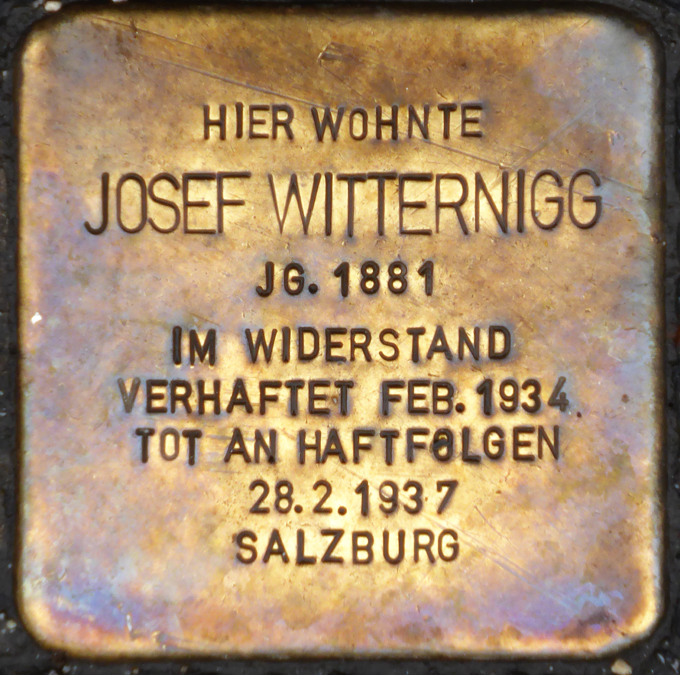 Stolperstein: Josef Witternigg (Rainerstraße 2), Salzburg.